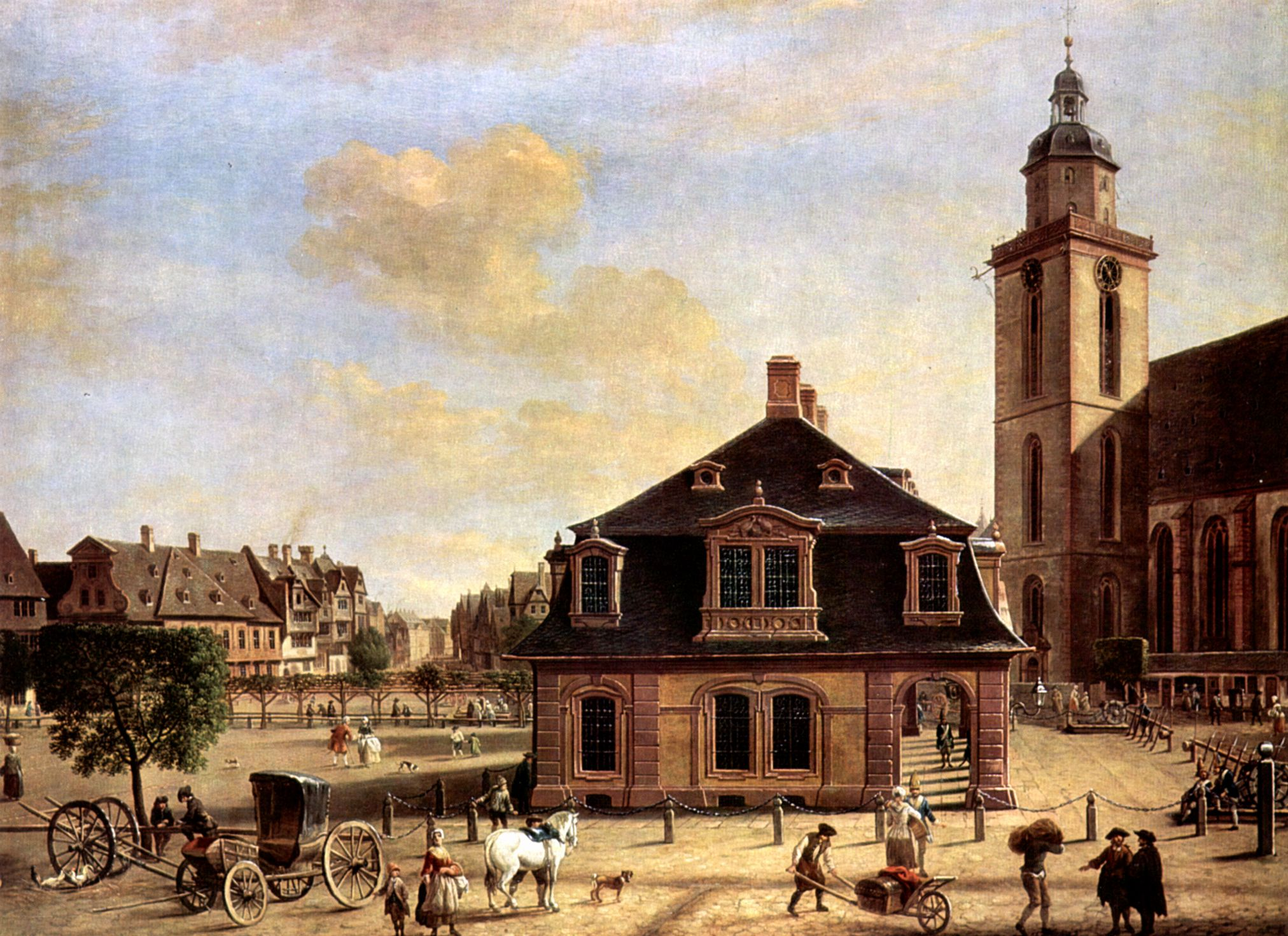 Öl auf Holz 71 x 97 cm; Hauptwache mit Blick auf Katharinenkirche und Zeil um 1760